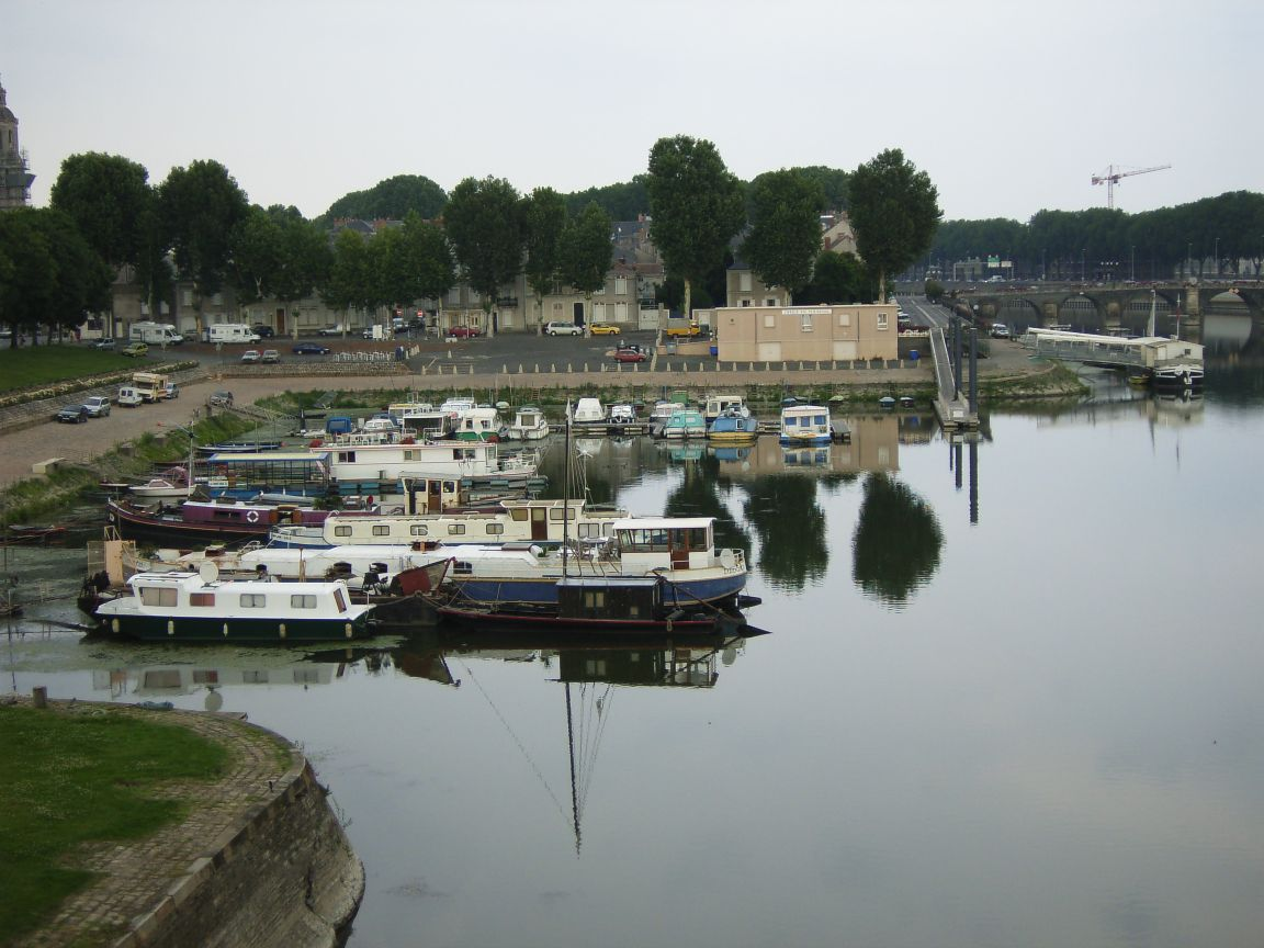 Blick auf den Hafen von Angers